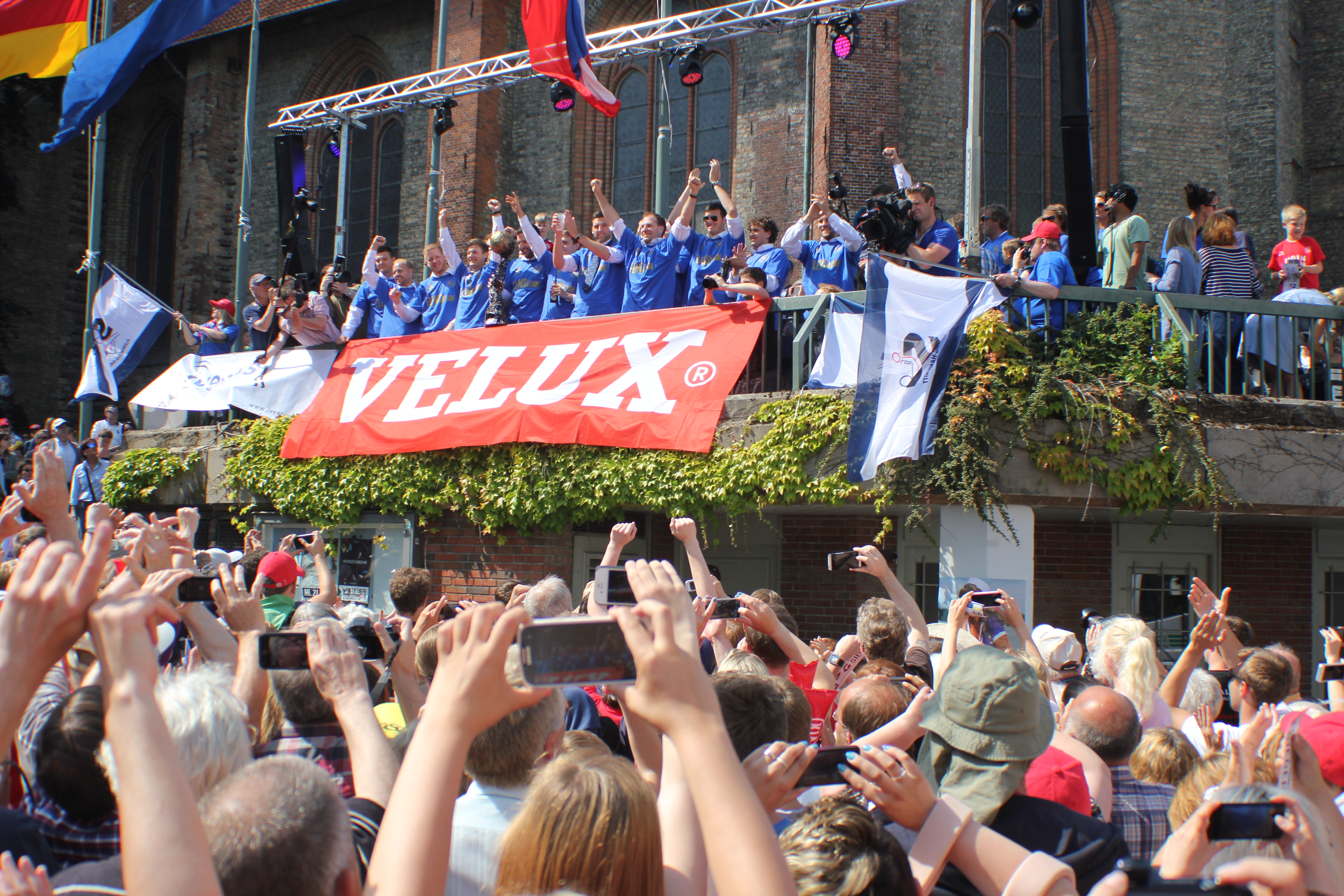 Jubelnde SG (Champions-League-Sieg, SG-Siegesfeier auf Südermarkt), Bild 011